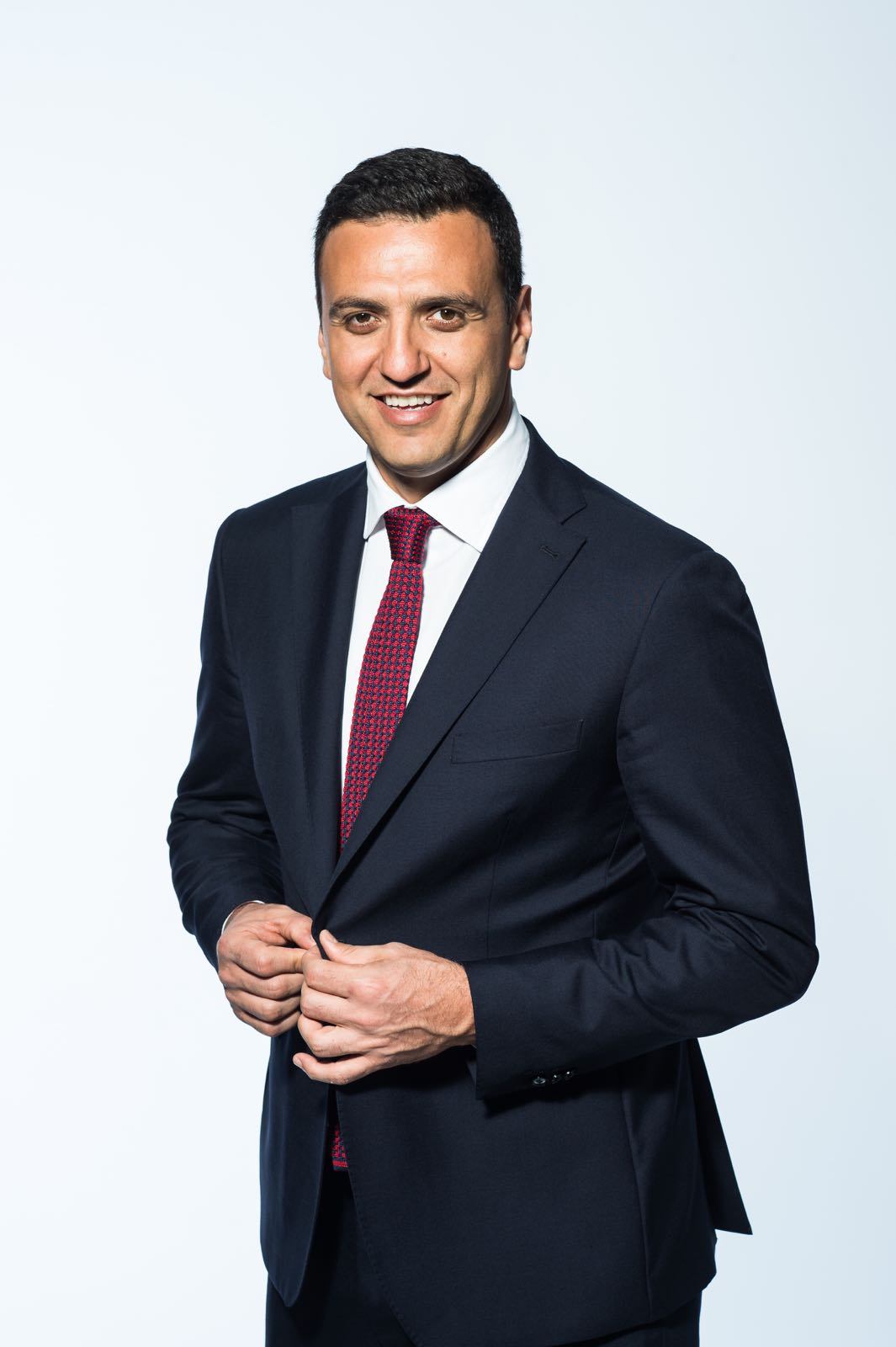 Vassilis Kikilias. Βασίλης Κικίλιας